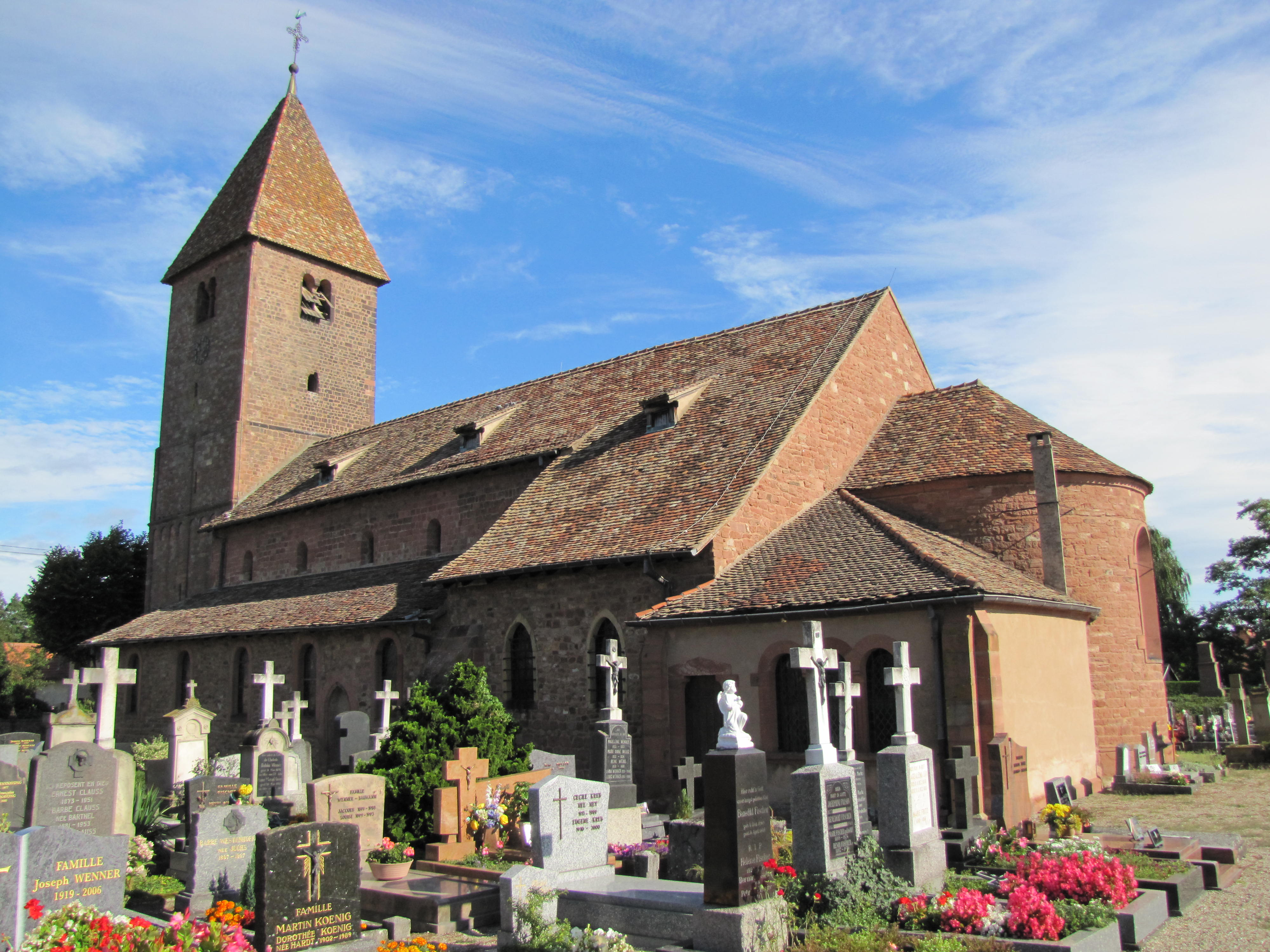 Alsace, Bas-Rhin, Wissembourg, Église Saint-Ulrich d'Altenstadt (PA00085244, IA67008249).